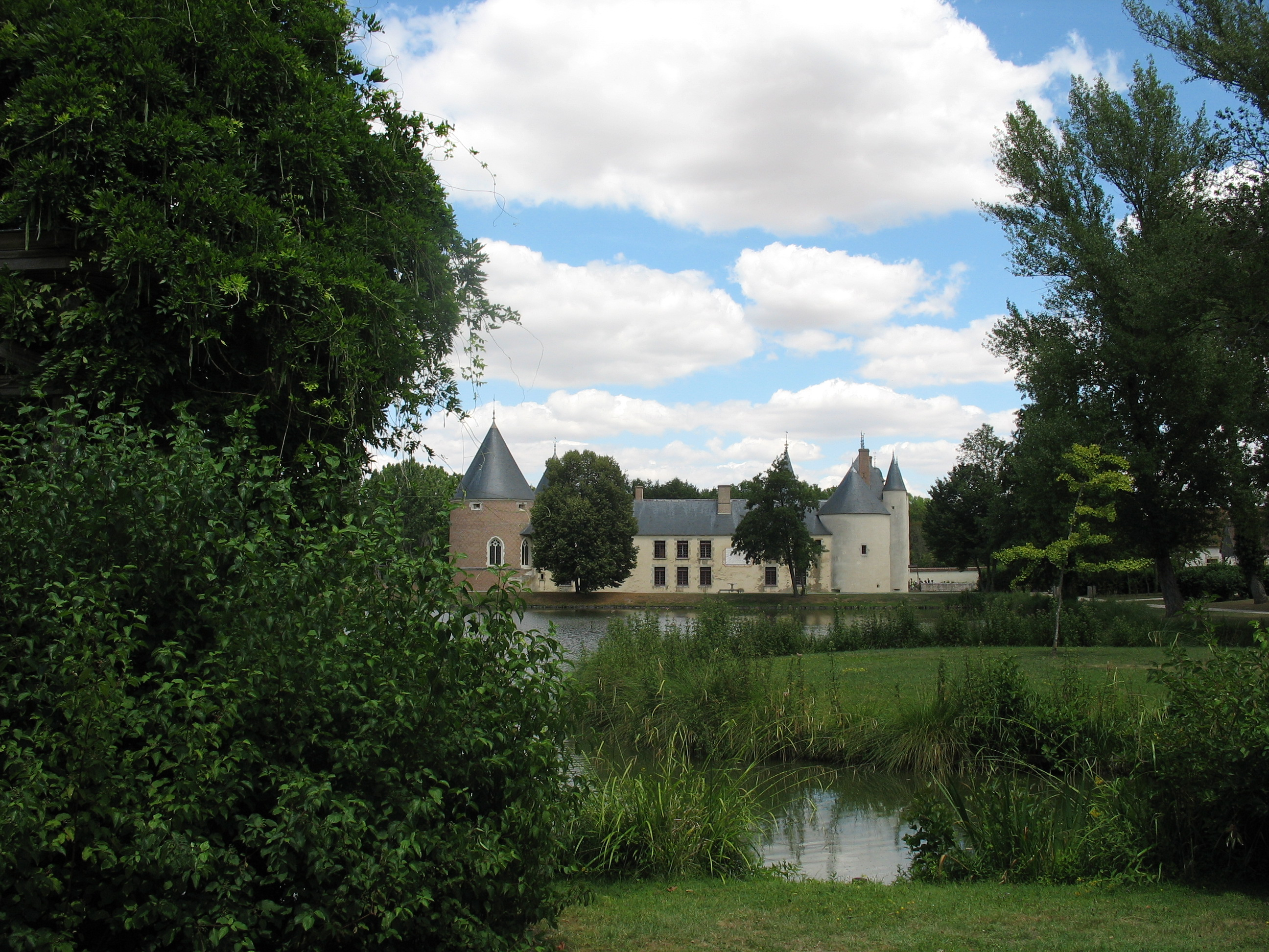 Le château de Chamerolles à Chilleurs-aux-Bois